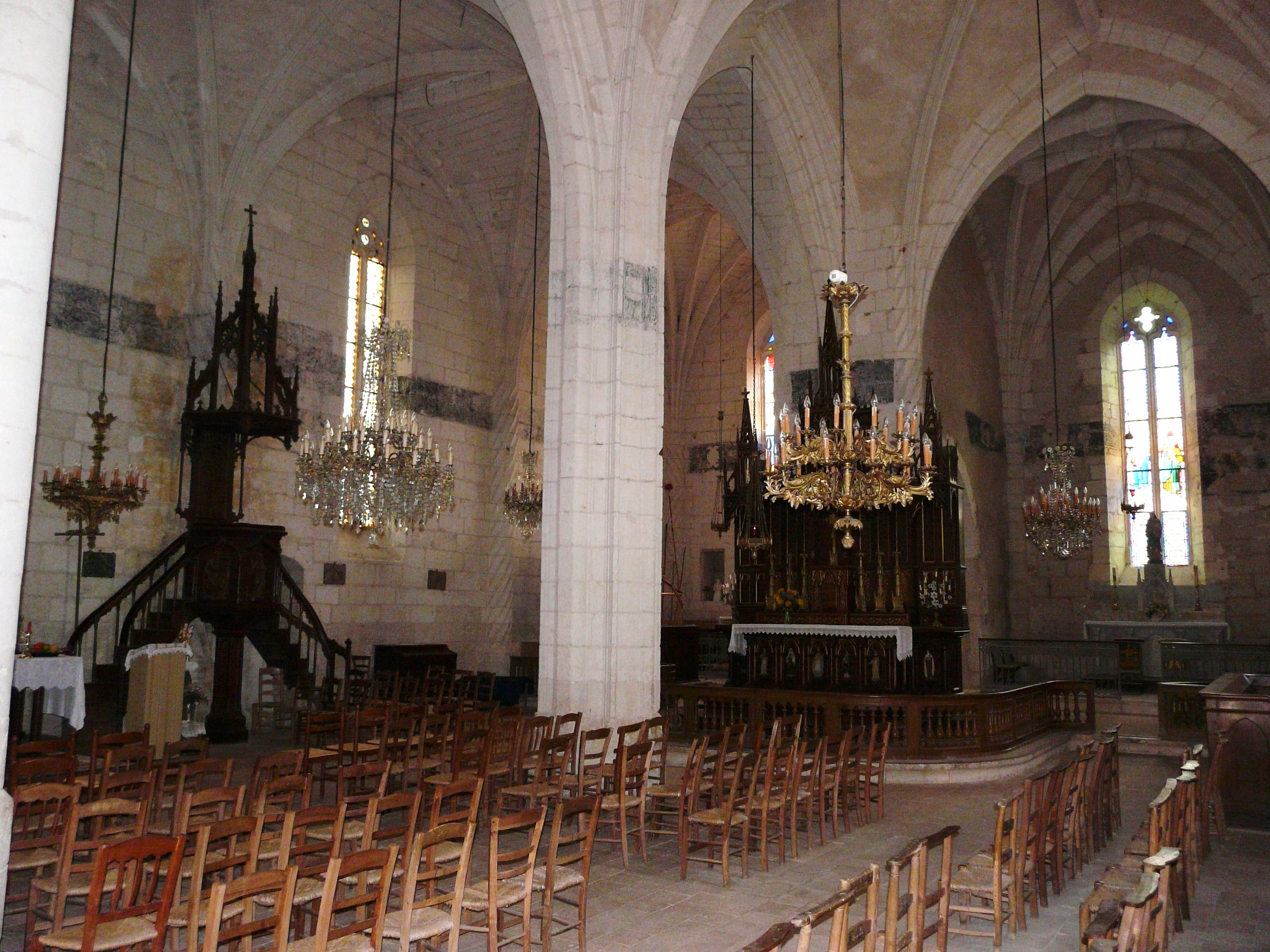 Les deux nefs de l'église Saint-Pierre-ès-Liens, Chantérac, Dordogne, France